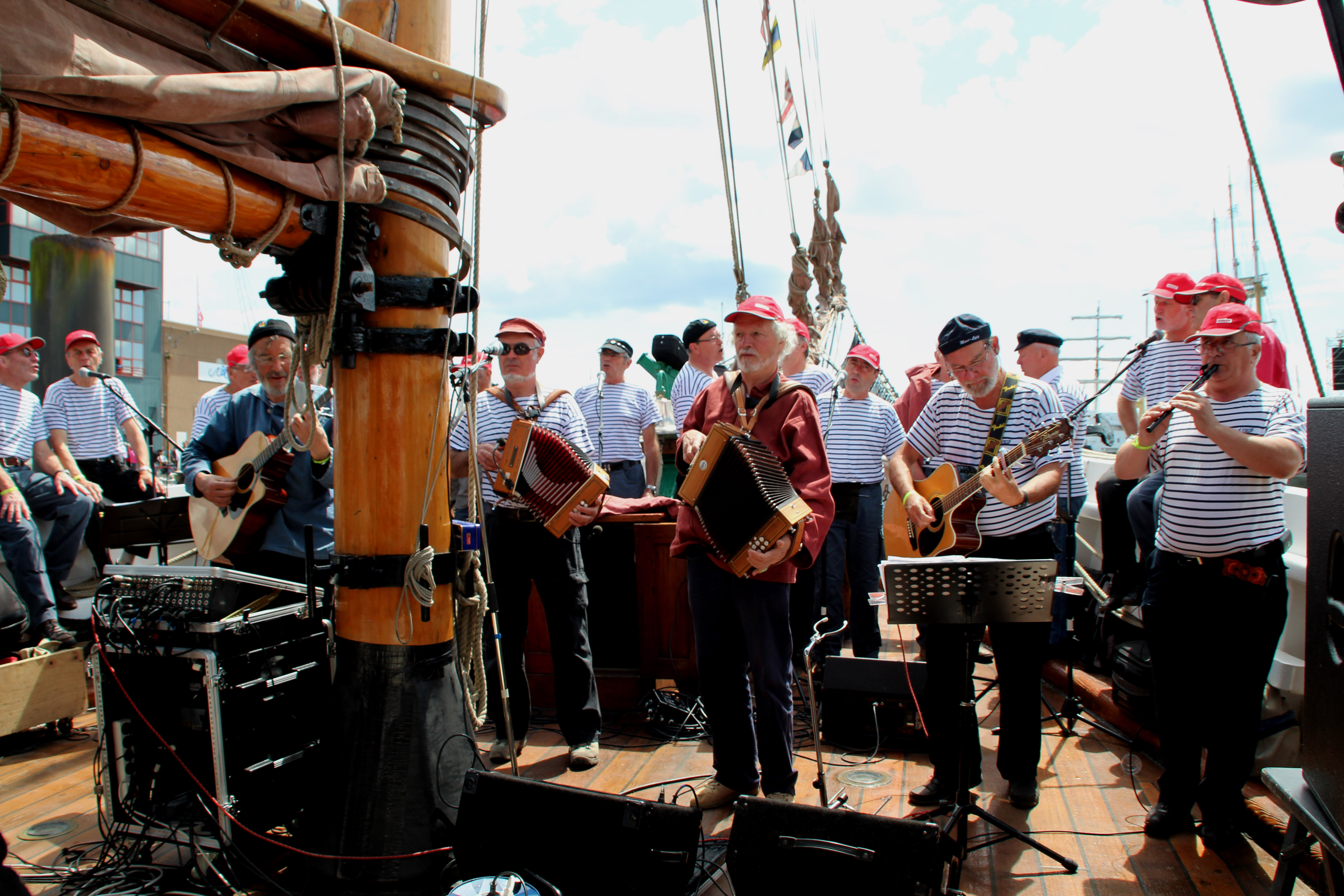 Tonnerres de Brest 2012-Chants de marins groupe : A virer- Plougastel-Daoulas - Finistère-France